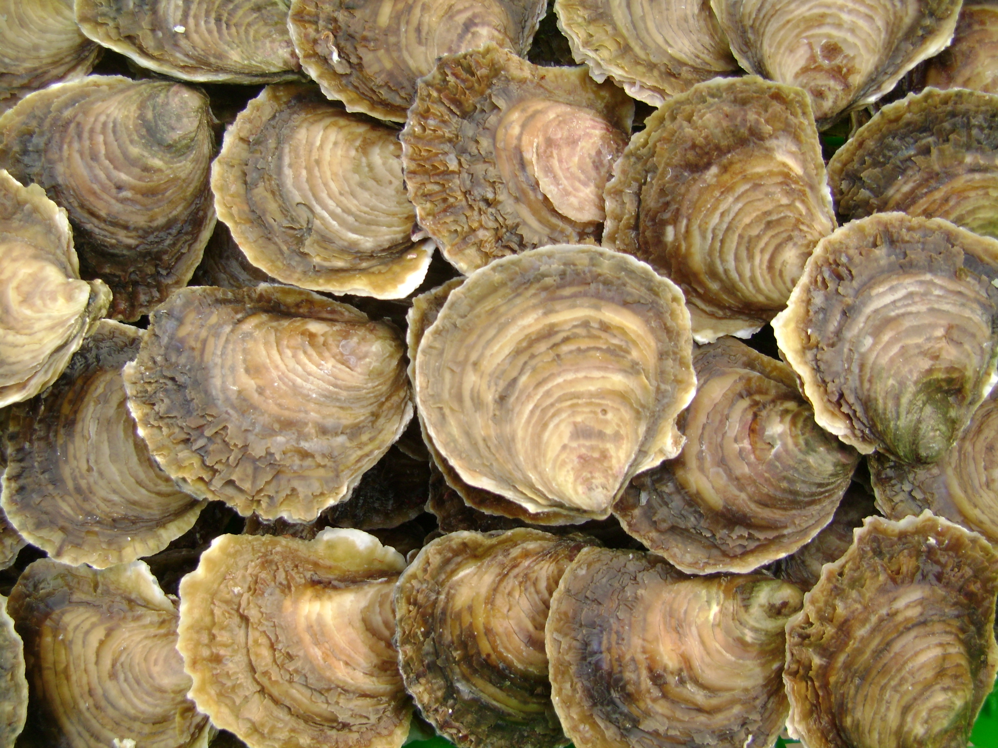 Huîtres plates de Logonna-Daoulas.JPG